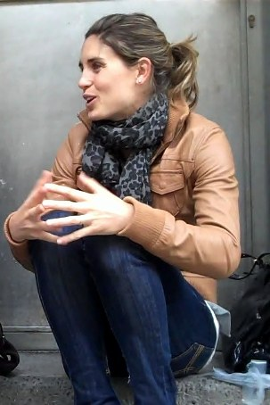 Naroa Agirre pertika-jauzilaria